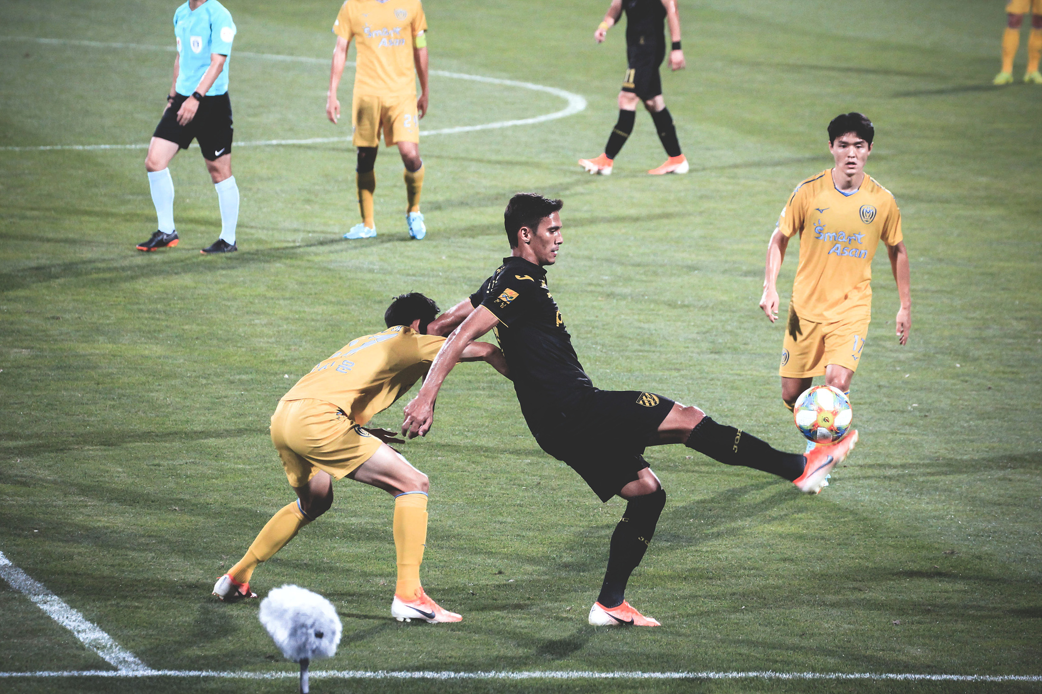 브라질선수 브루노가 화려한 개인기를 보여주고 있다. 전남드래곤즈소속이다.